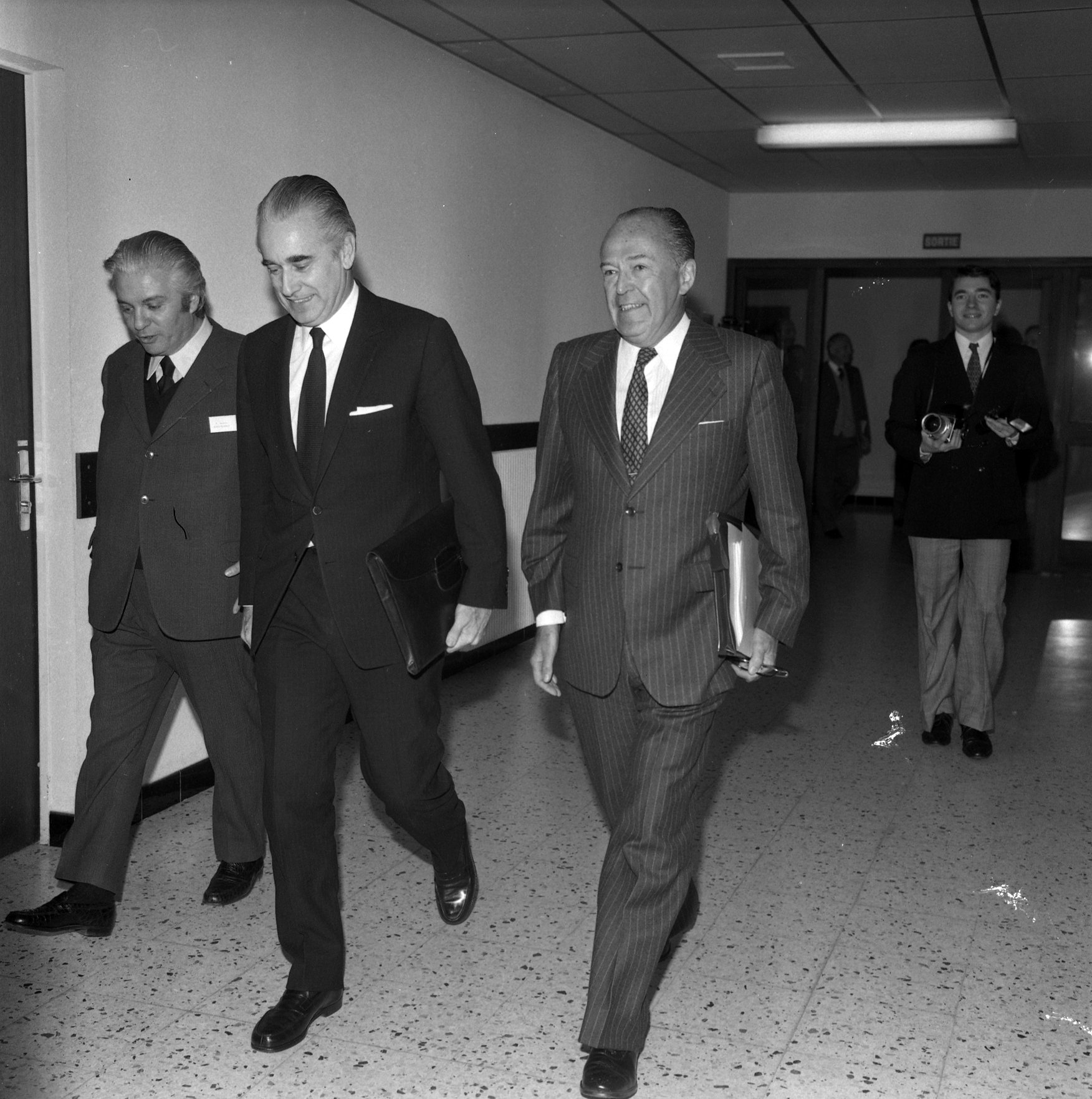 Pas de lieu. Le 7 Mars 1974. Vue de Pierre Baudis et de Jacques Chaban-Delmas dans un couloir.